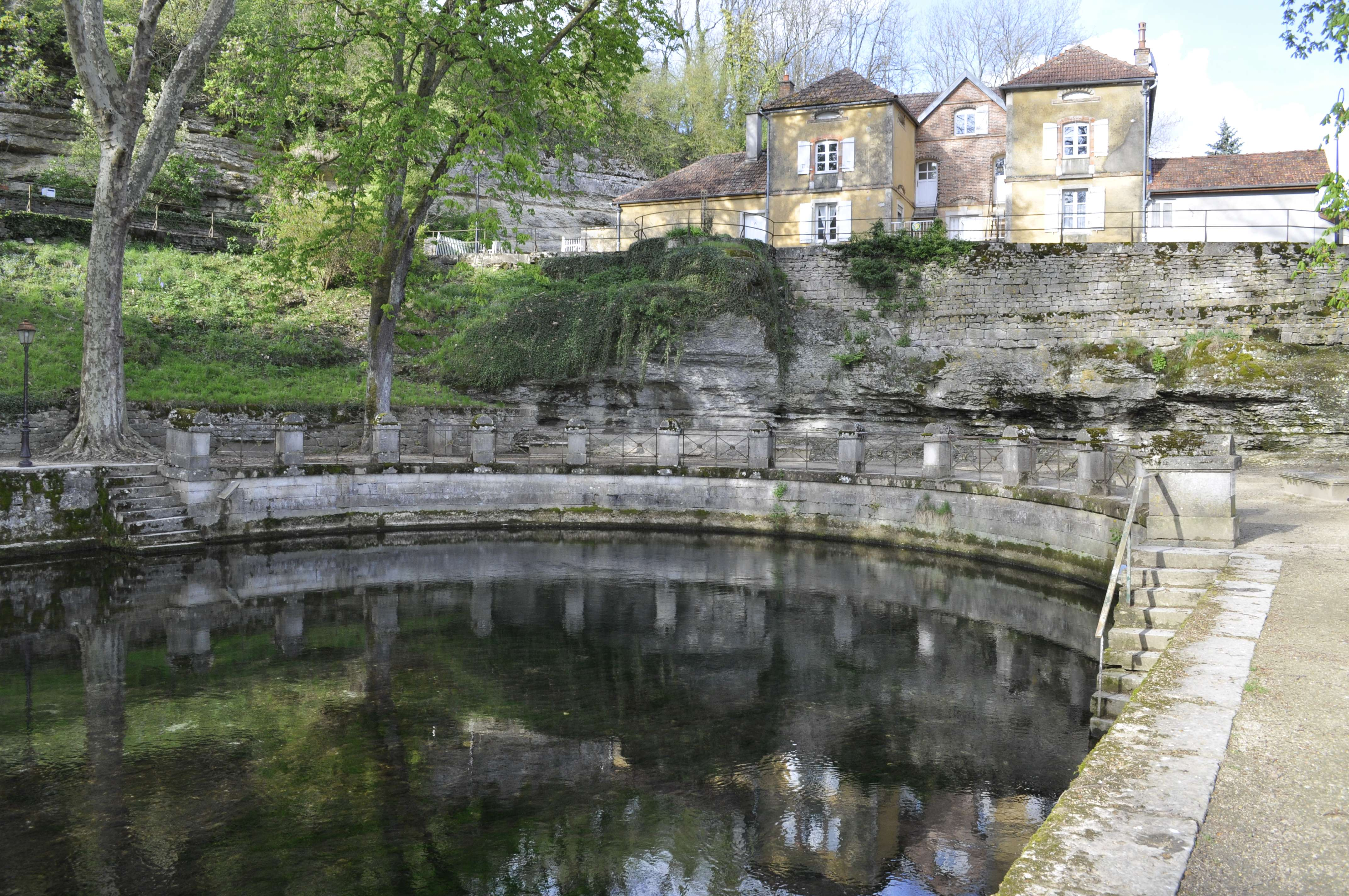 Source de la Bèze à Bèze, Bourgogne, (Côte d'Or), FRANCE